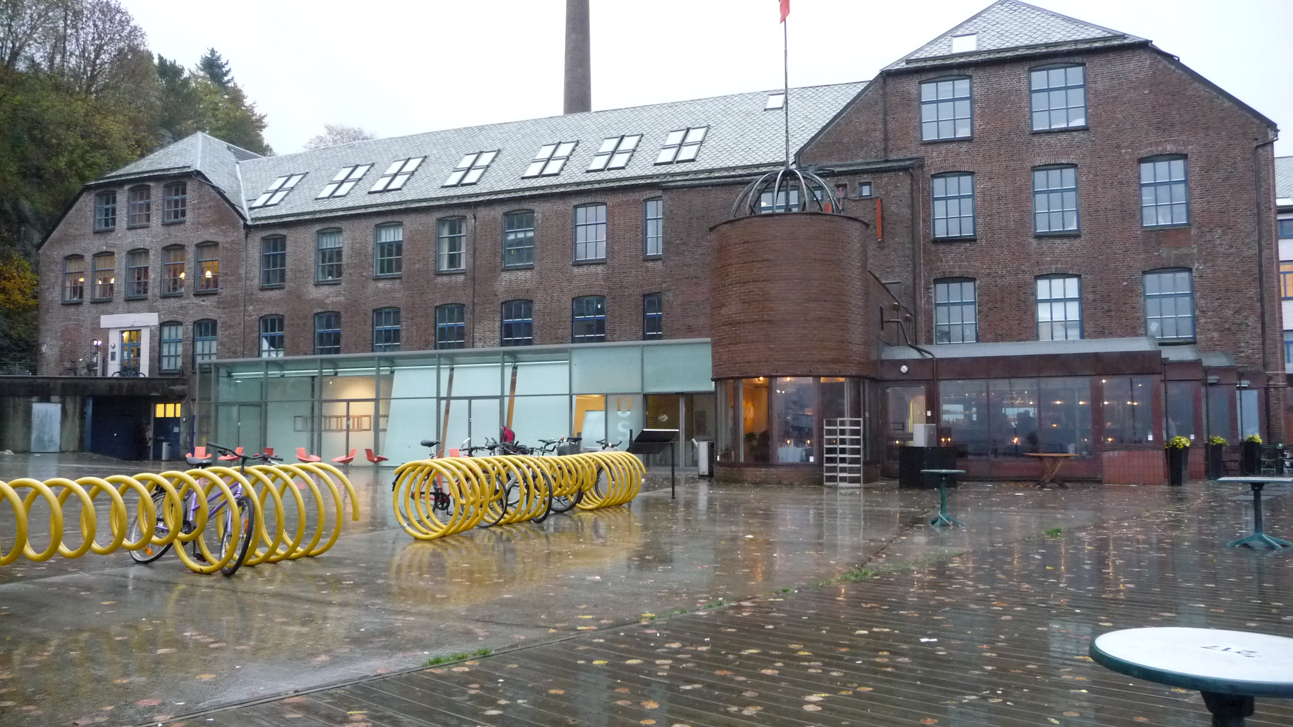 Bergen's Cultural Center in Former Sardine Factory (USF Verftet)